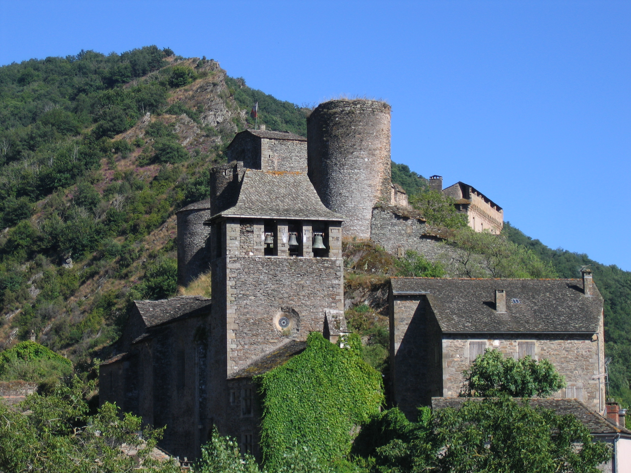 Brousse-le-Château (Aveyron): le château et l'église. Photo Christophe Chauvin.